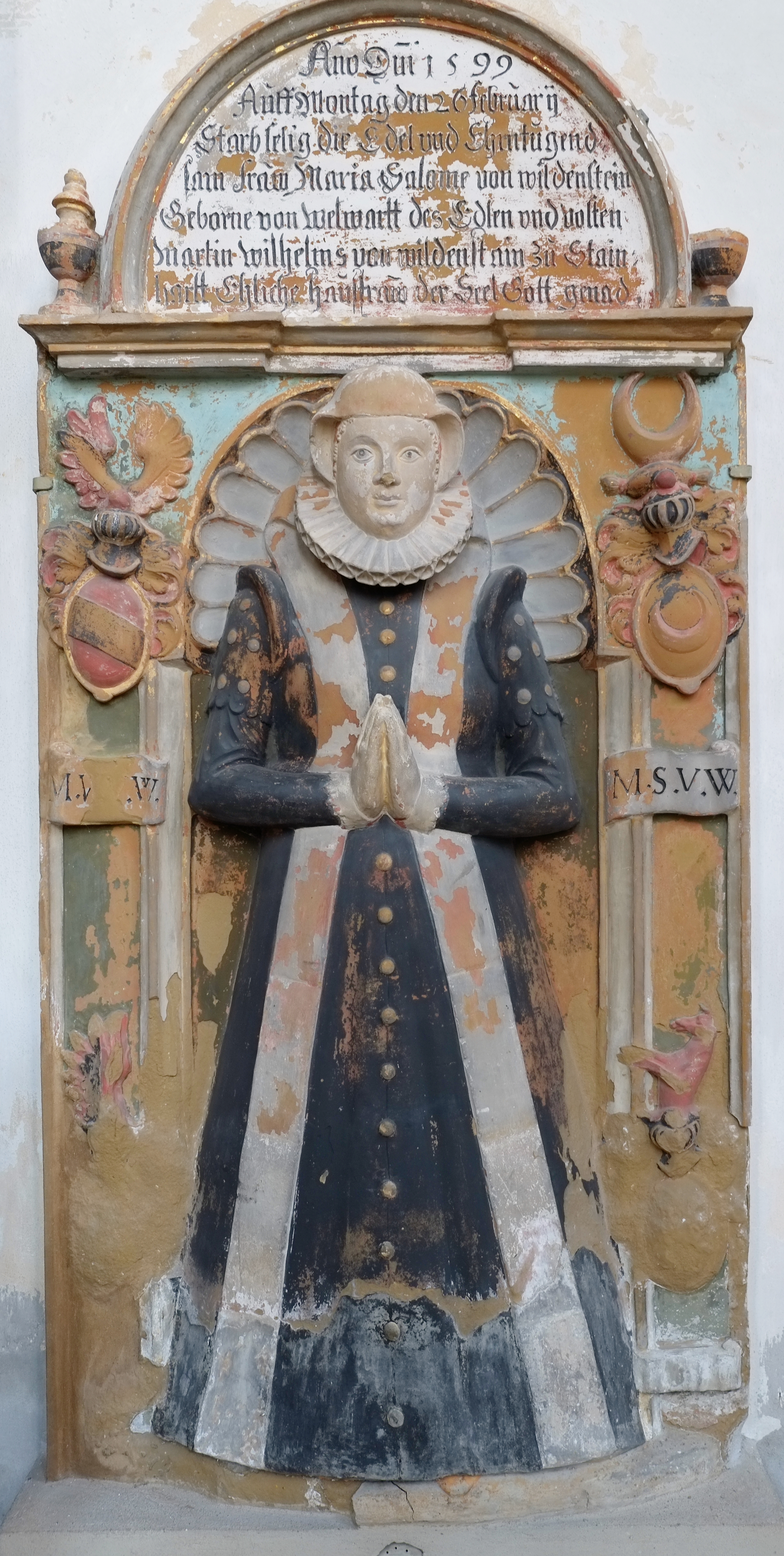 Evangelische Kirche St. Jakob in Oettingen in Bayern (Bayern), Grabstein für Maria Salome von Wildenstein geb. von Welwarth († 1599)